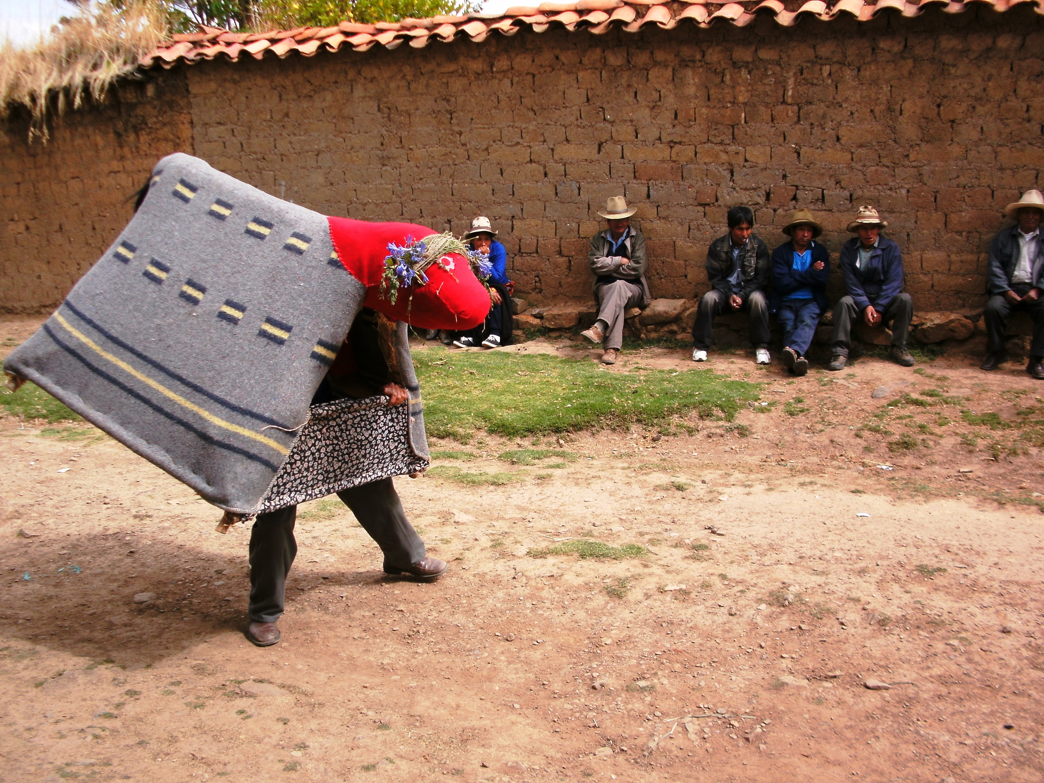 El chucaro y pícaro toro